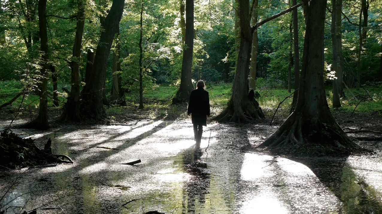 Klaus Weingarten in "Morgenröte im Aufgang" im Eiswald (Film Still)